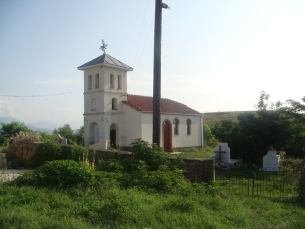 Село Подвис Црква